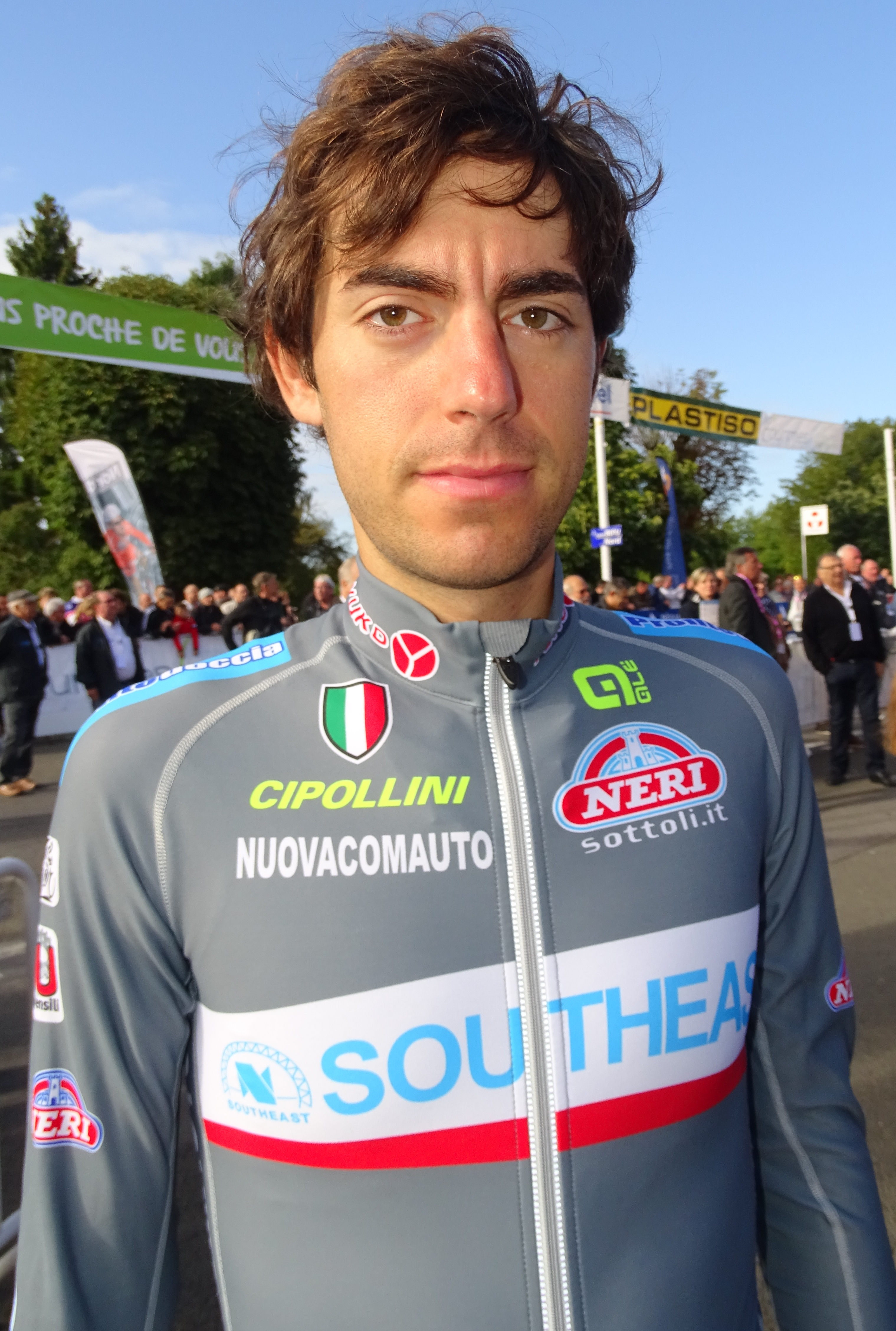 Reportage réalisé le dimanche 6 septembre à l'occasion du départ et de l'arrivée du Grand Prix de Fourmies 2015 à Fourmies, Nord-Pas-de-Calais, France.